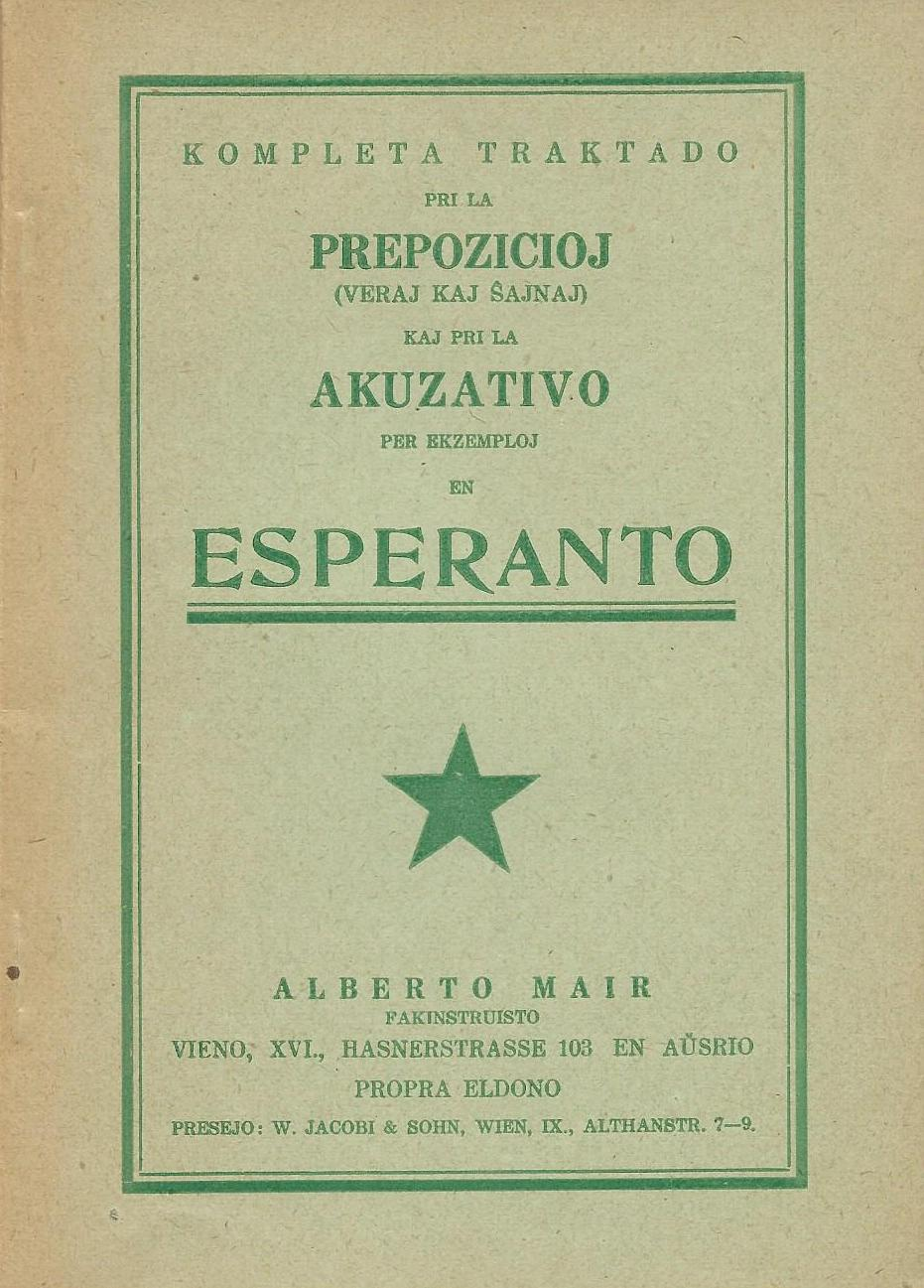 librokovrilo "Kompleta Traktado pri la Prepozicioj kaj pri la Akuzativo per Ekzempleoj en Esperanto", 1926